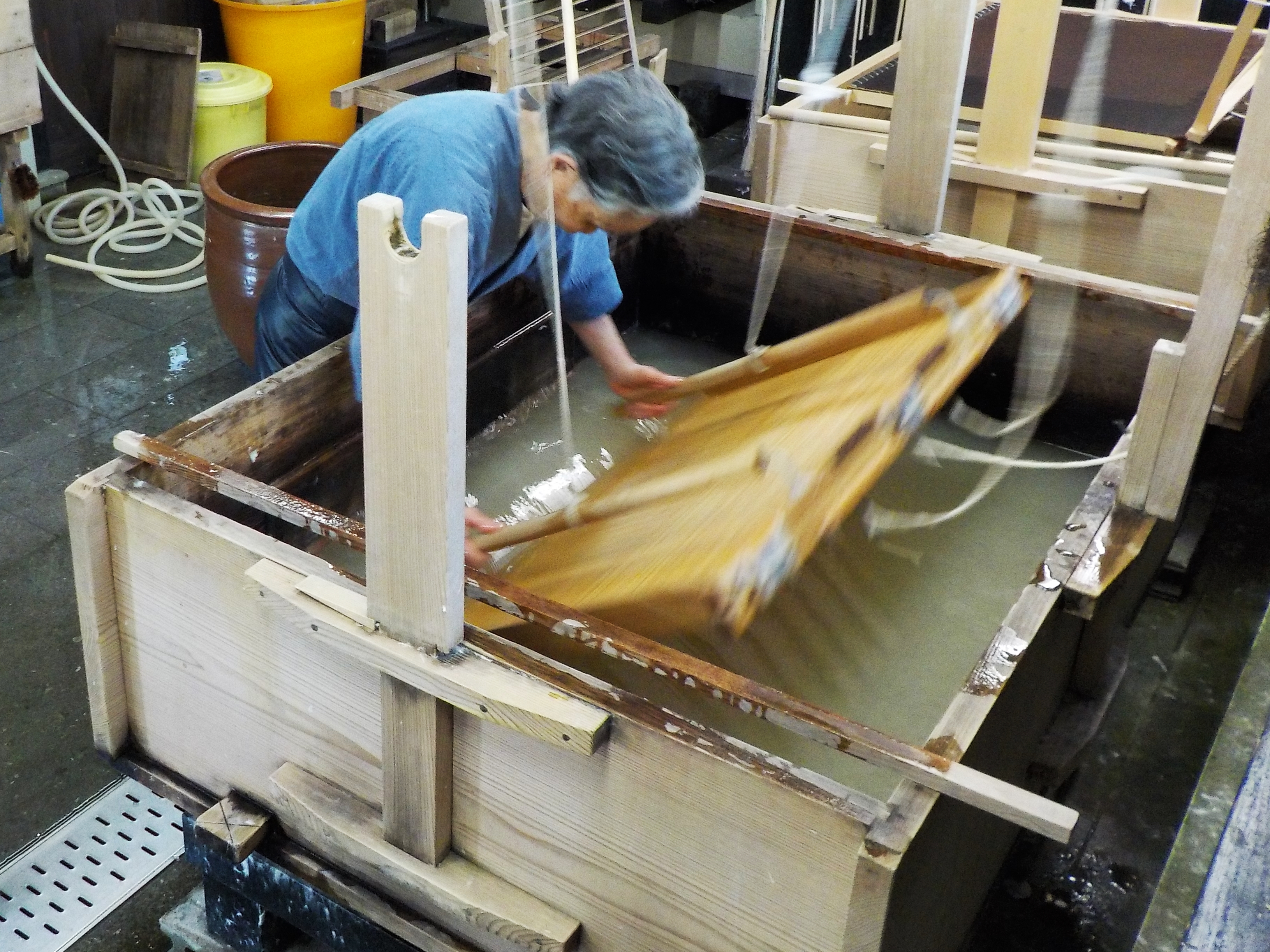 福井県越前市の「卯立の工芸館」の紙漉き。